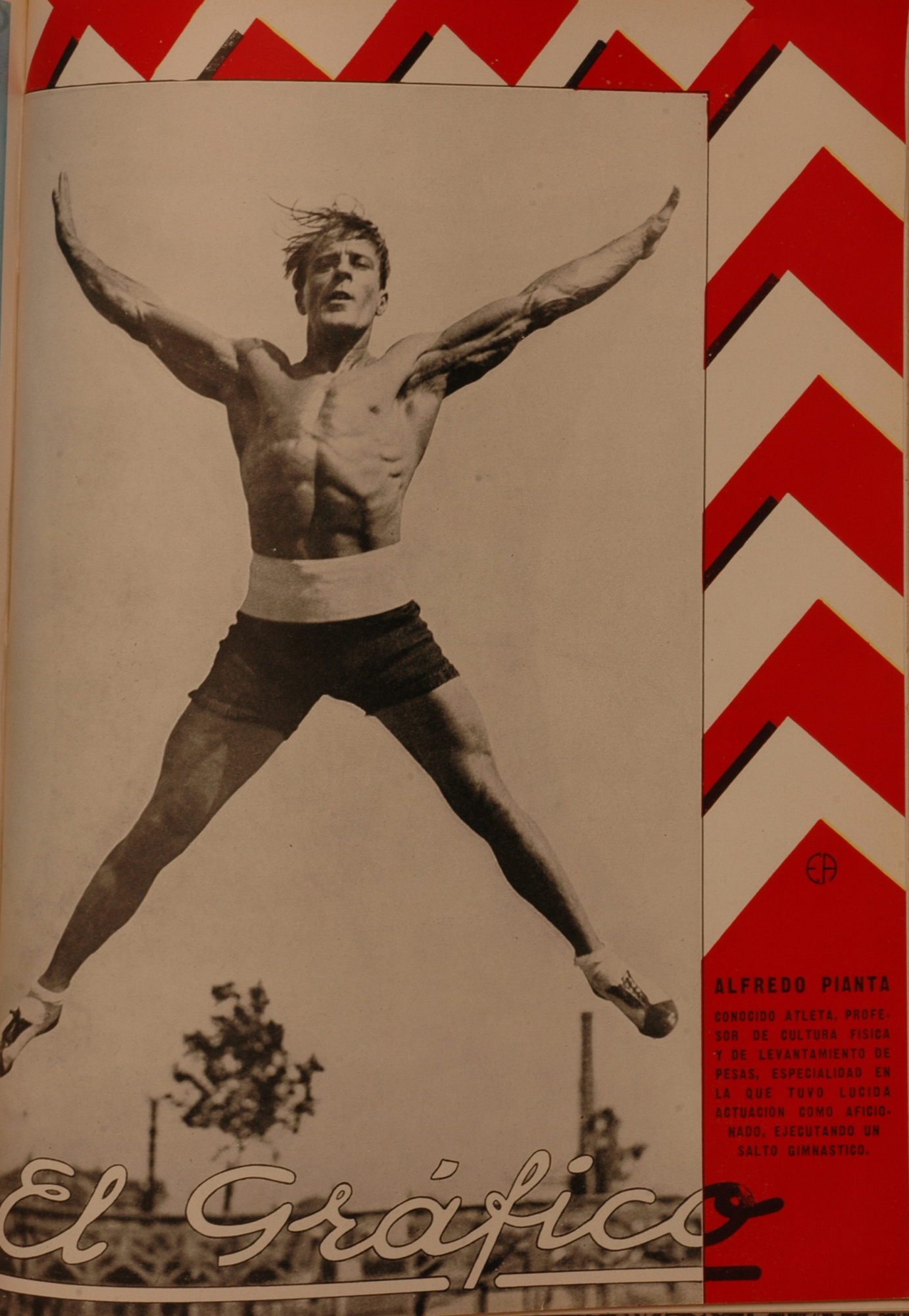 El Grafico del 06 de Febrero de 1932. Edicion 656